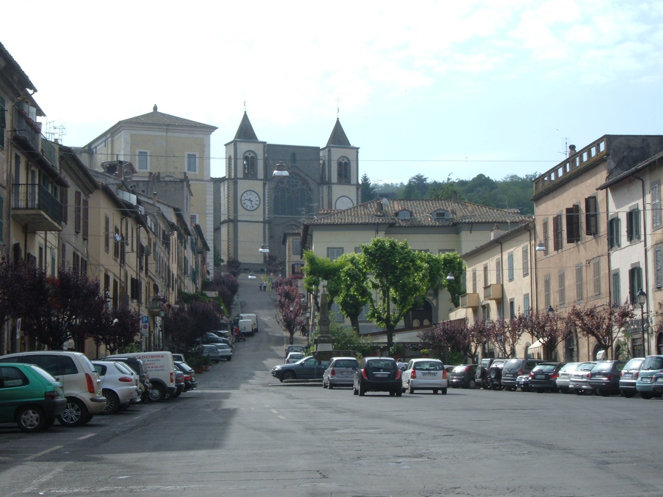 Vista di San Martino al Cimino